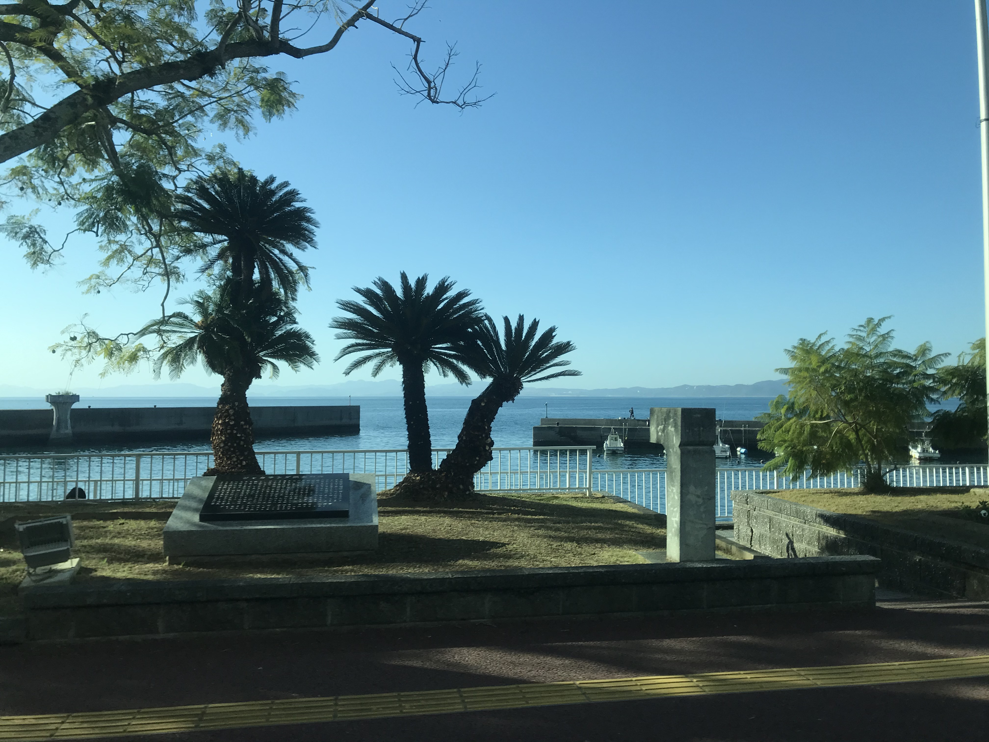 国道57号・251号のバス車内より望む橘湾と小浜温泉街